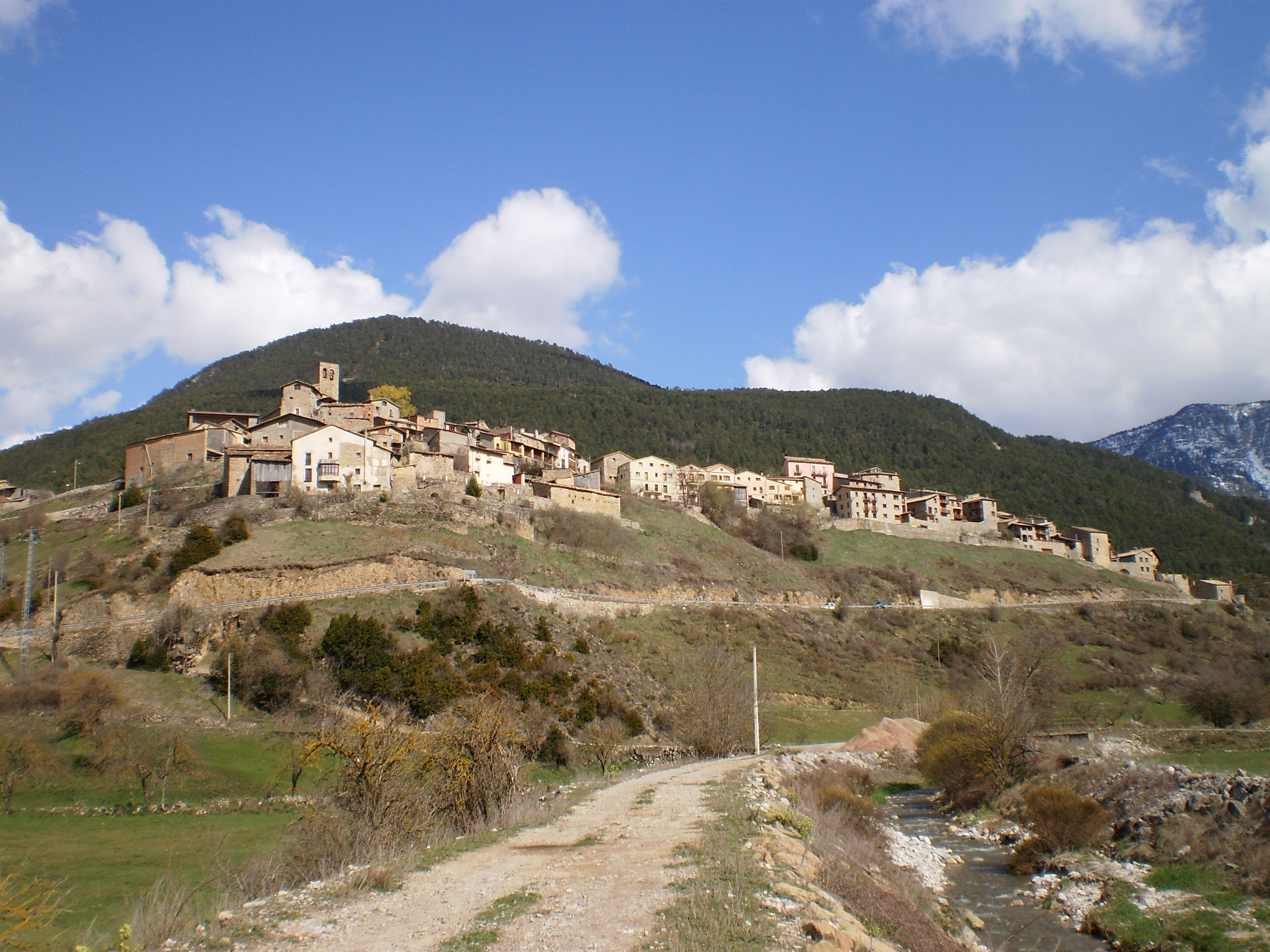 Tuixent, des de la confluencia dels rius de Mola i Josa